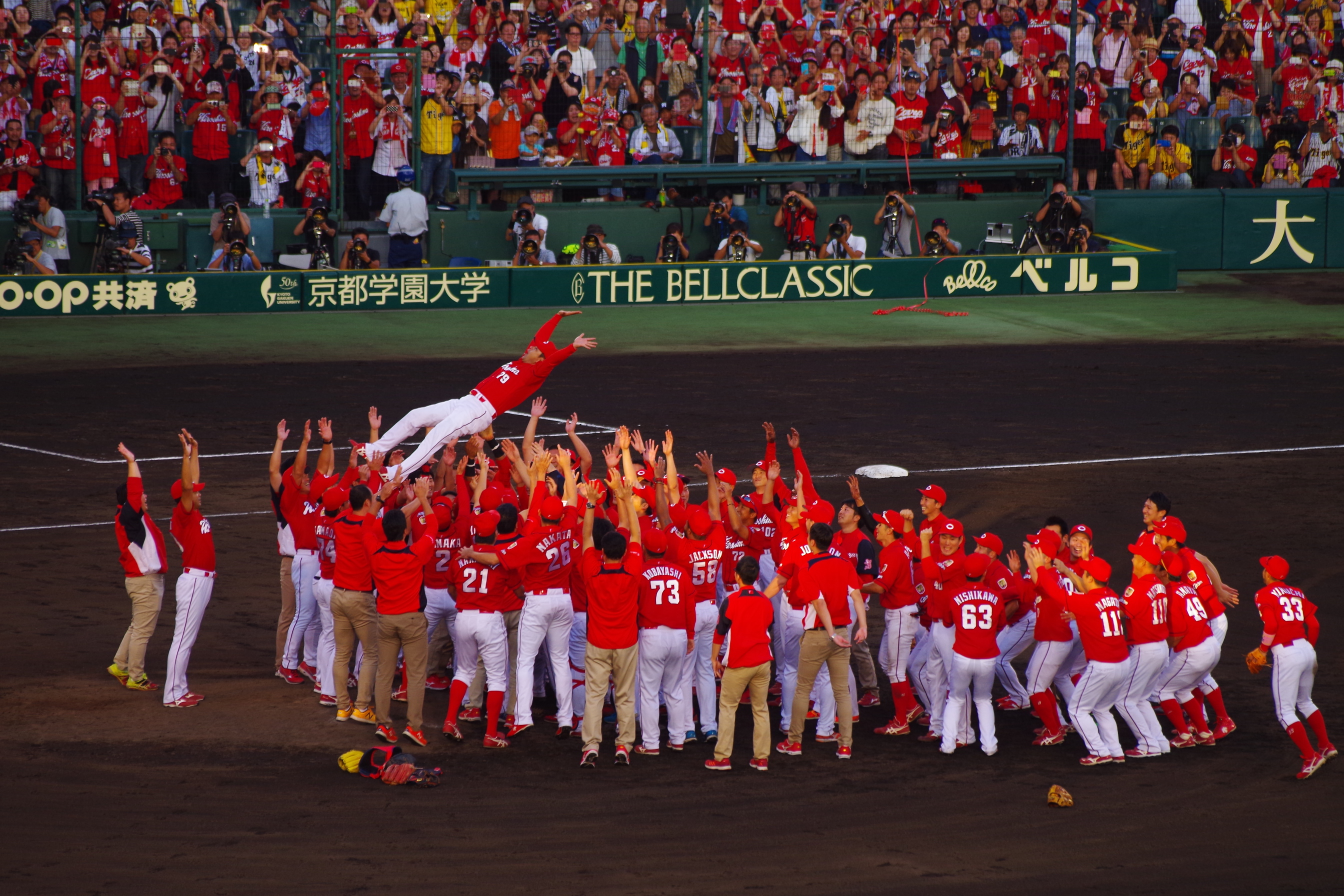 2017年広島東洋カープリーグ優勝後の胴上げ 阪神甲子園球場にて